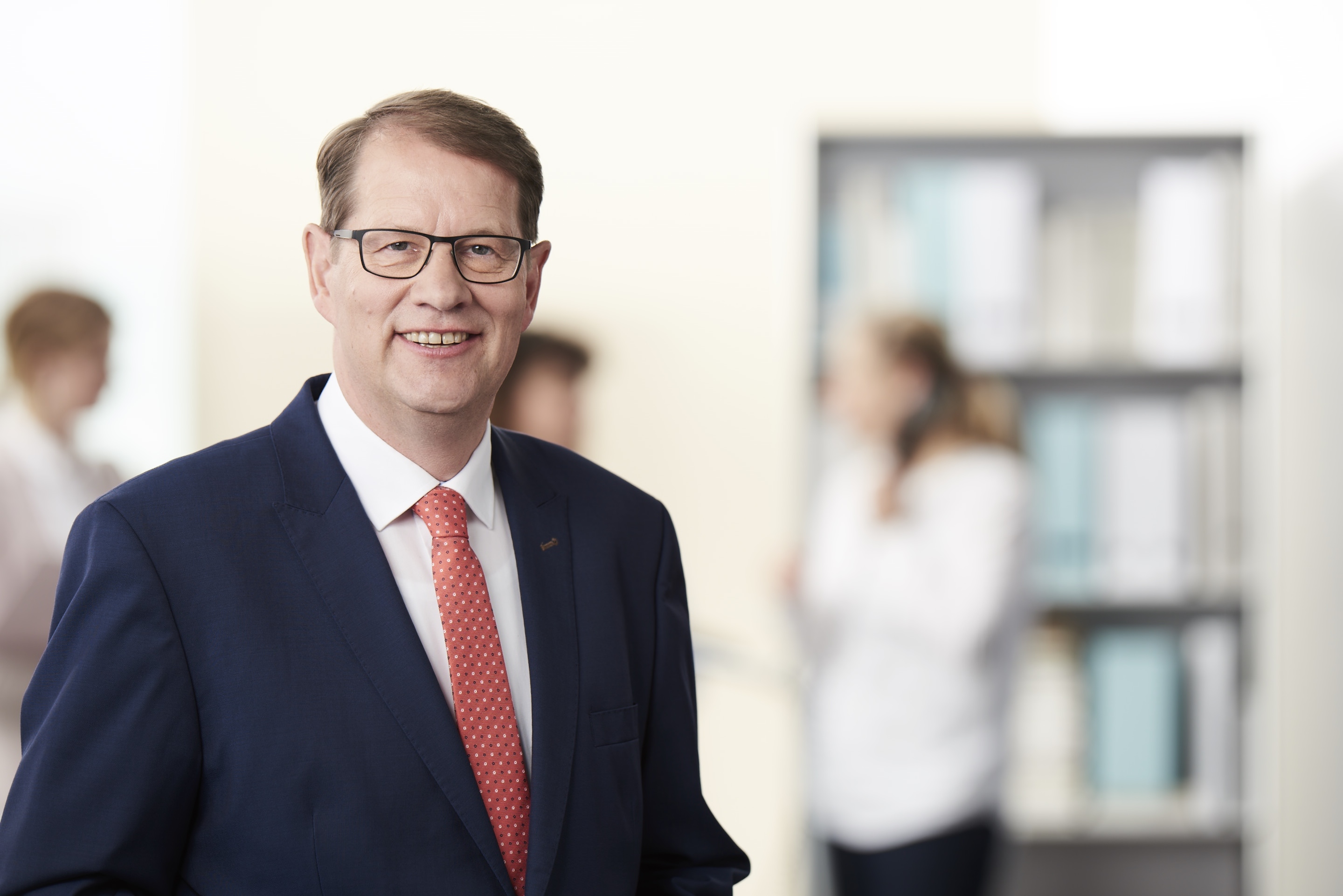 Foto zur Wahlkampagne 2017